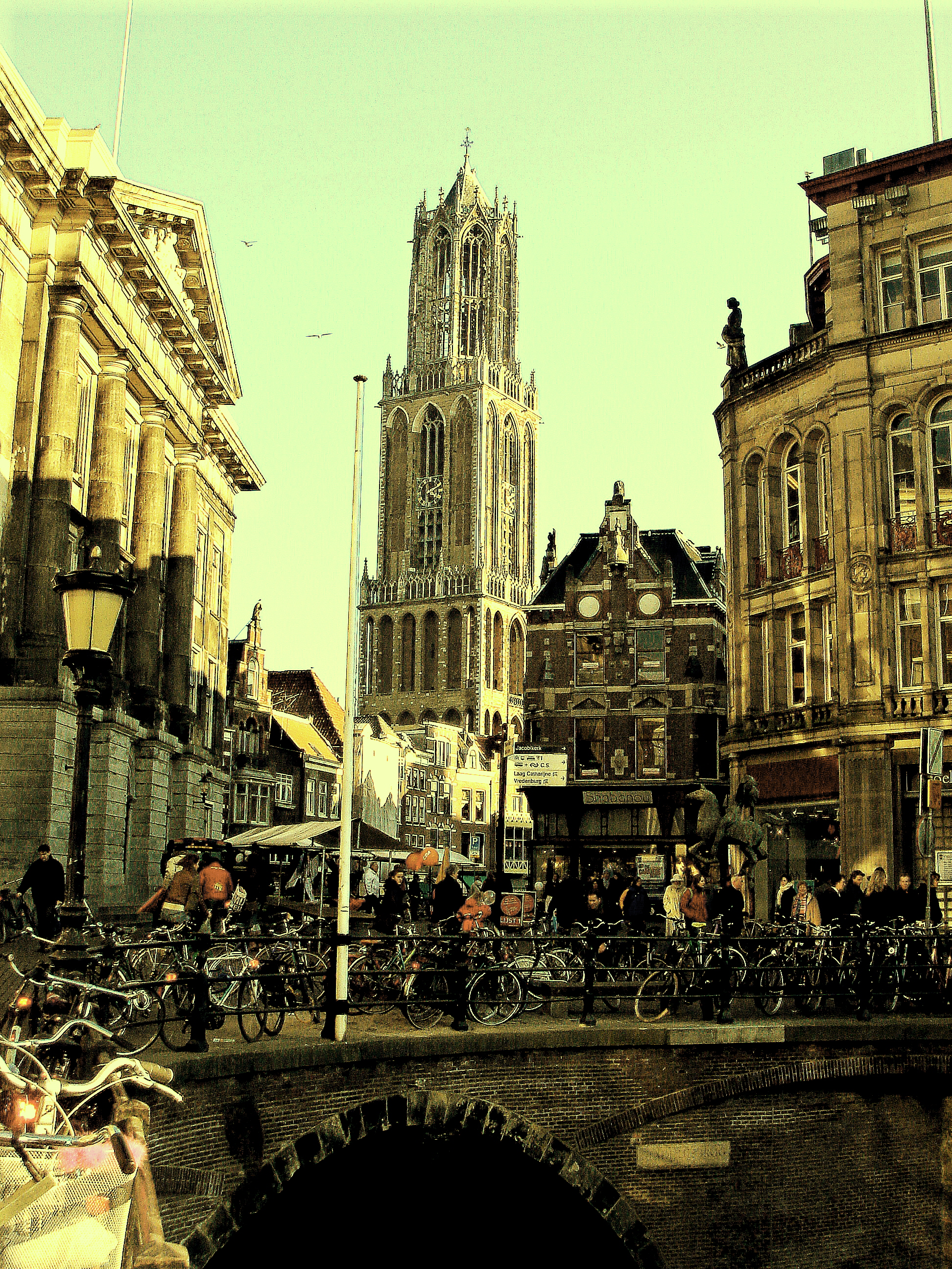 Domtoren vanaf de Stadhuisbrug